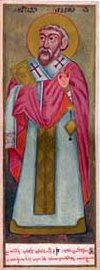 Grigol Khandzteli